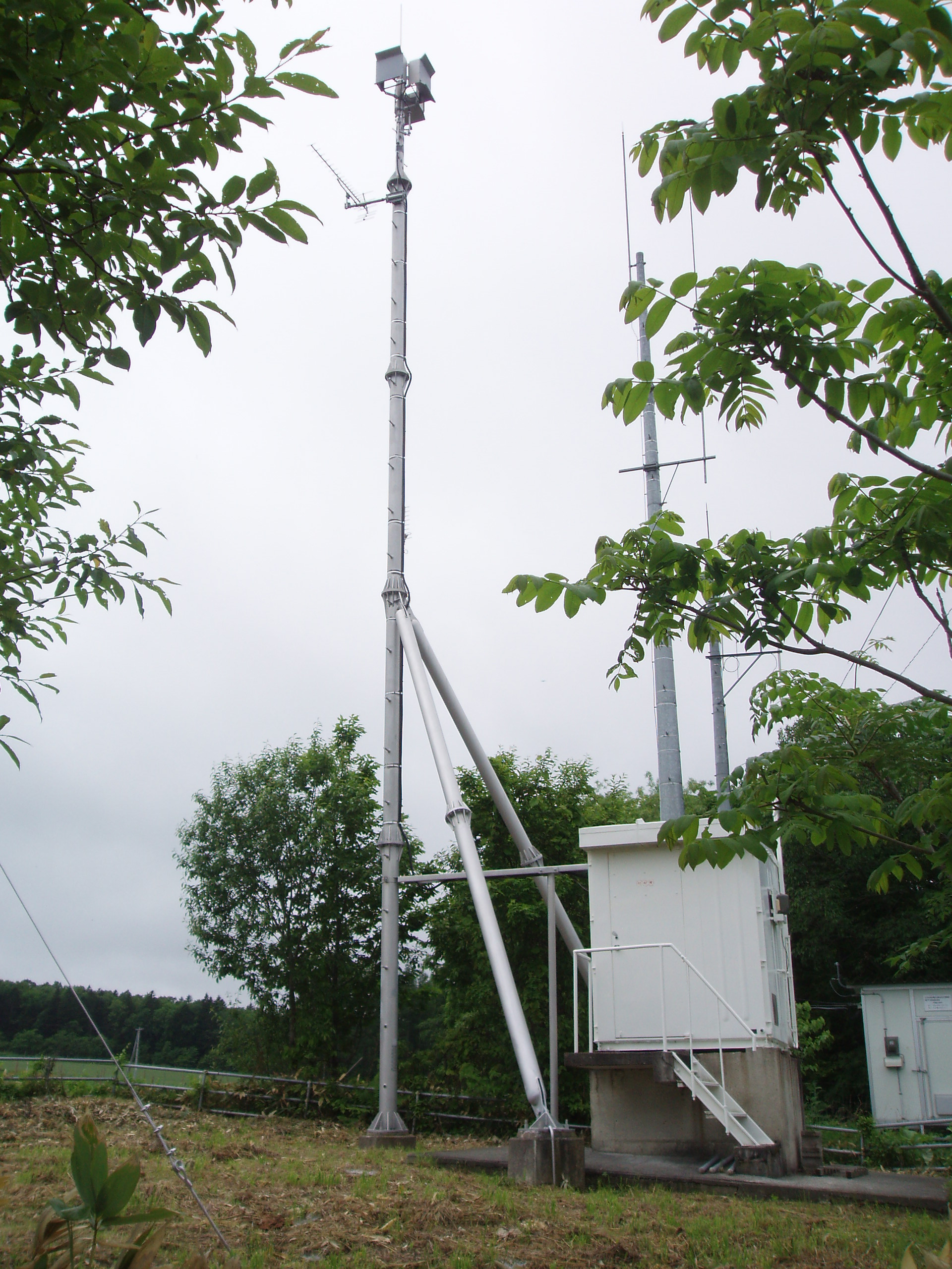 置戸中継局 NHK送信設備